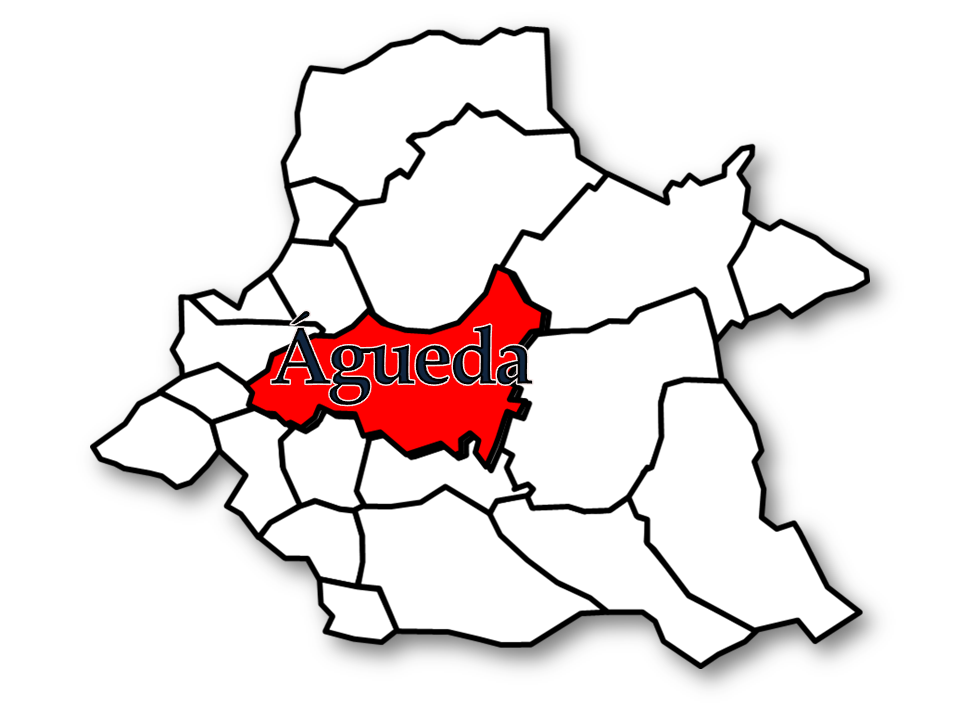 Censos 1864/2011